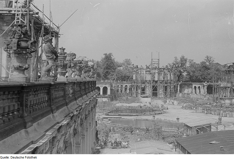 Original image description from the Deutsche FotothekBlick von Balustrade in den Zwingerhof